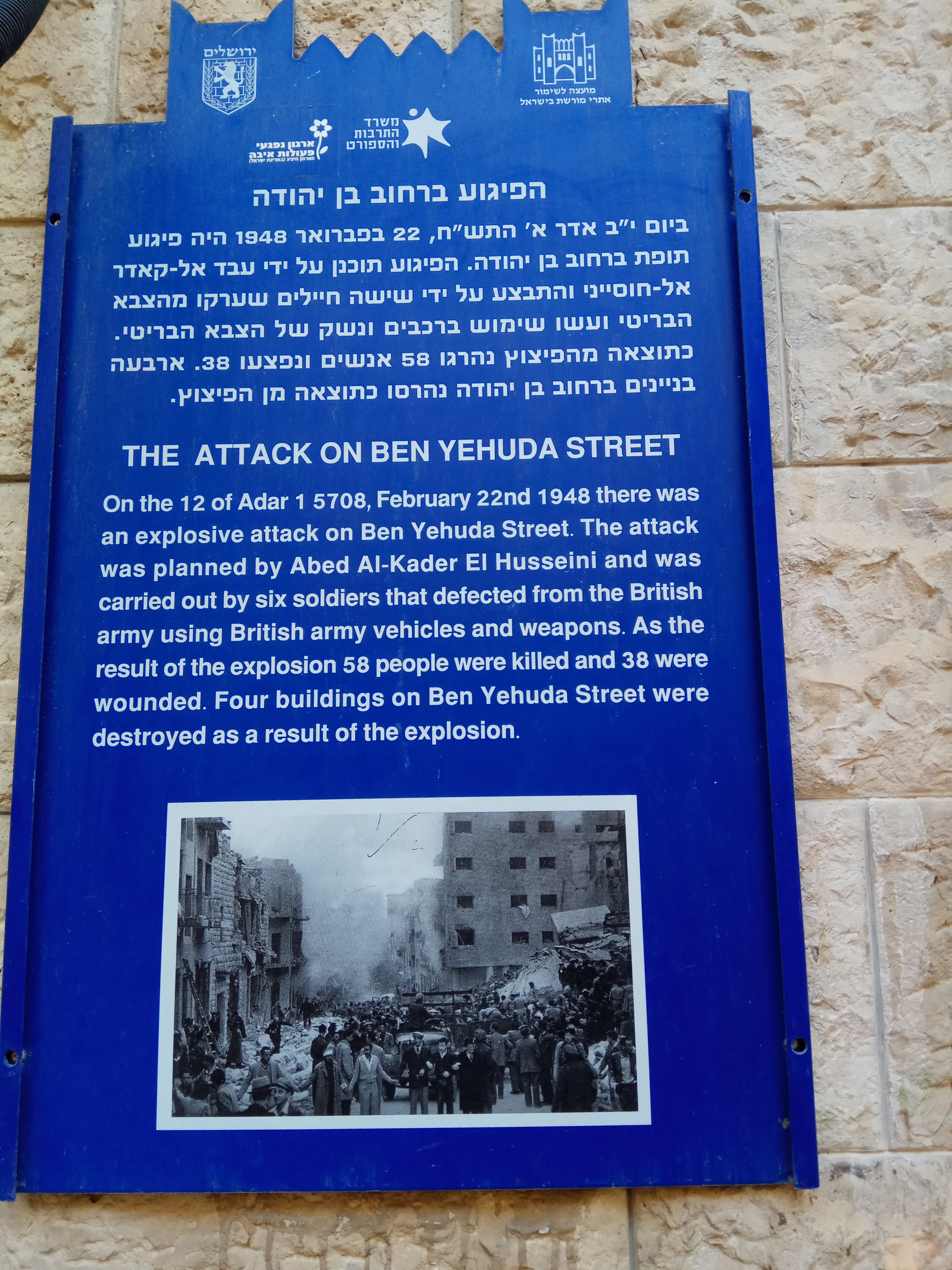 לוחית זיכרון לפיגוע בשנת 1948 ברחוב בן יהודה בירושלים